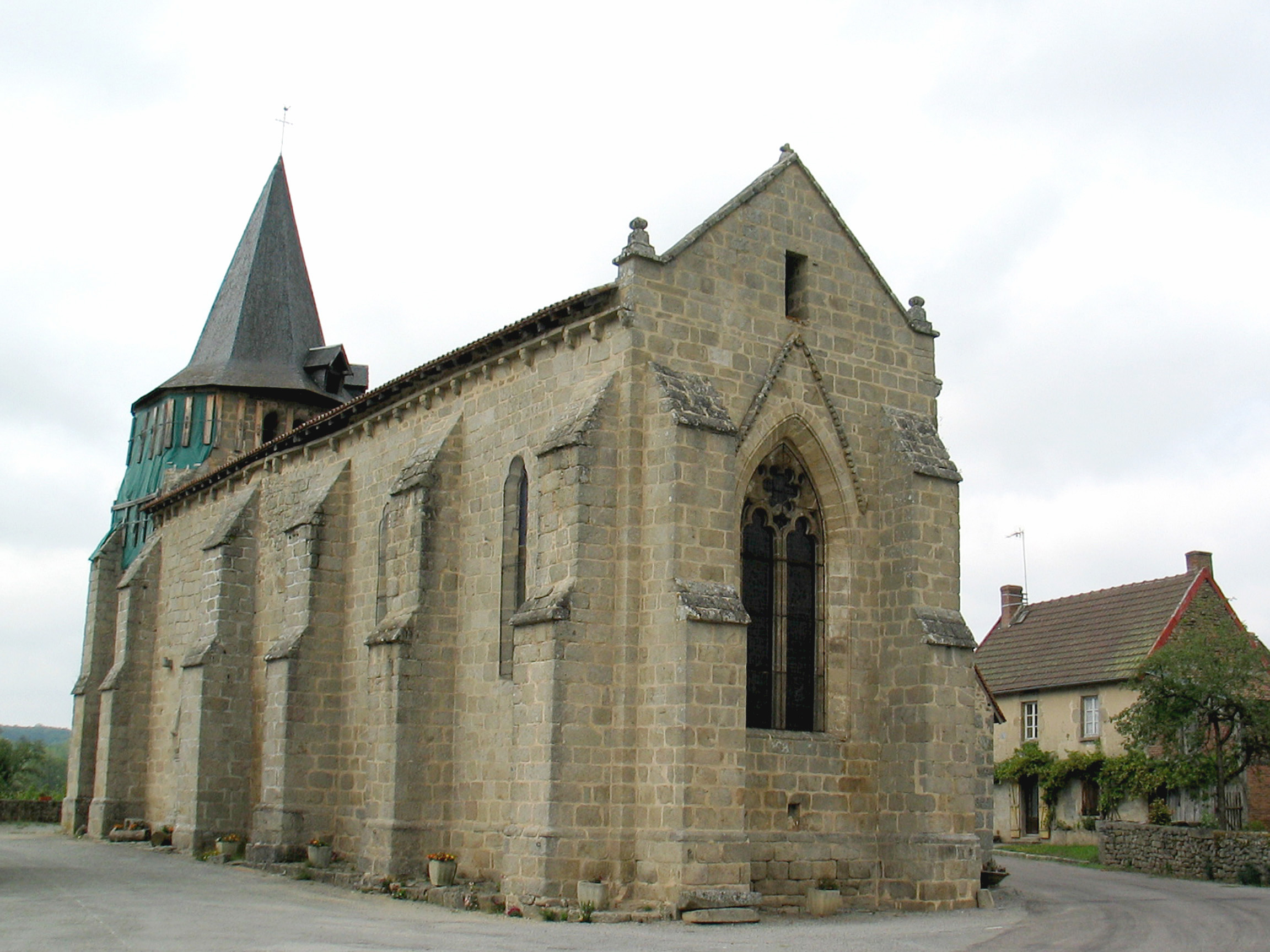 Église Saint-Barthélemy d'Ars, (Classé, 1983)